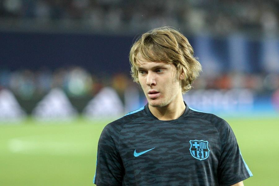 Перед матчем за Суперкубок УЄФА 2015 року у Тбілісі. Грузія